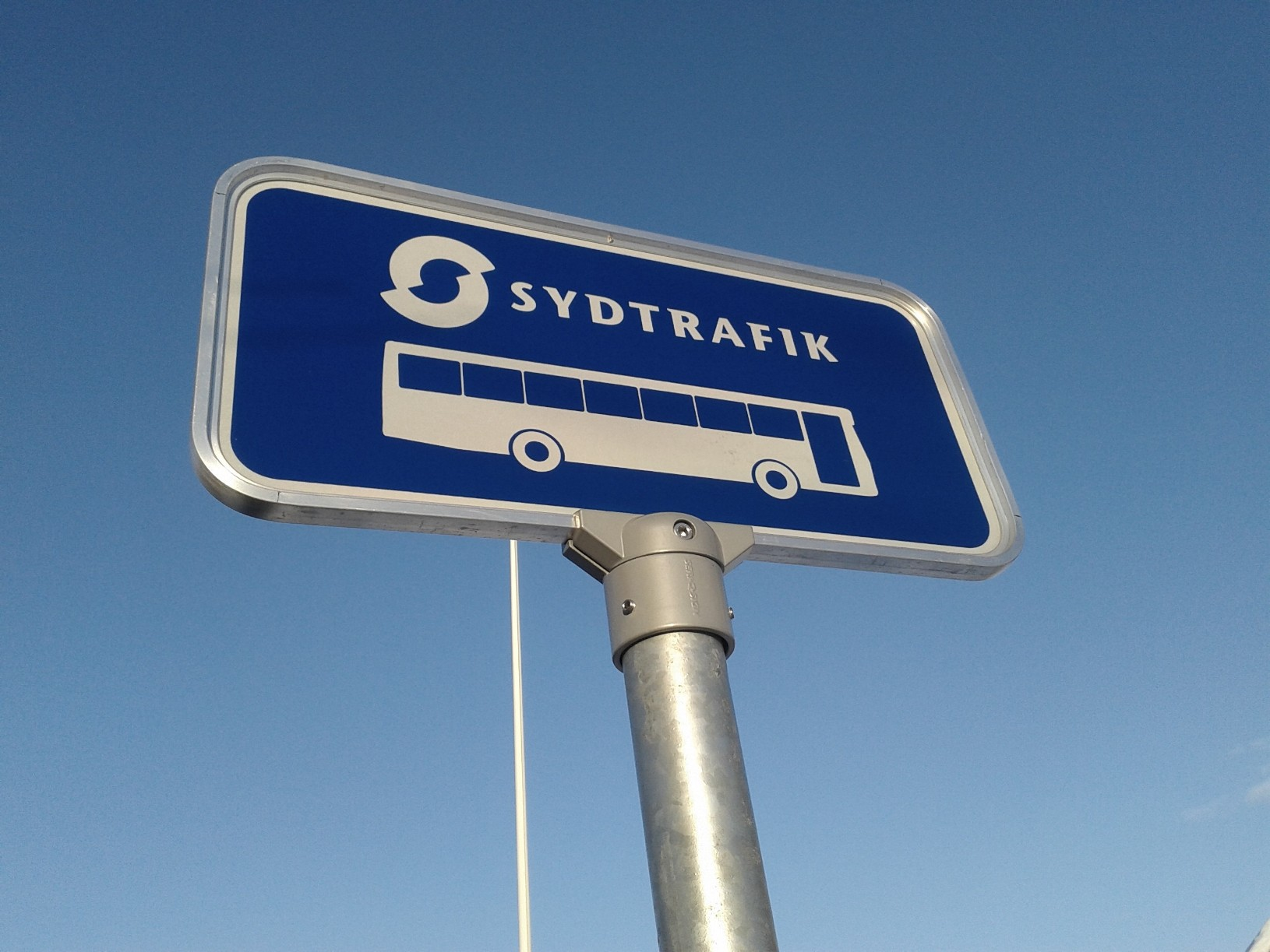 Skilt som optræder på alle Sydtrafiks stoppesteder i Syddanmark.